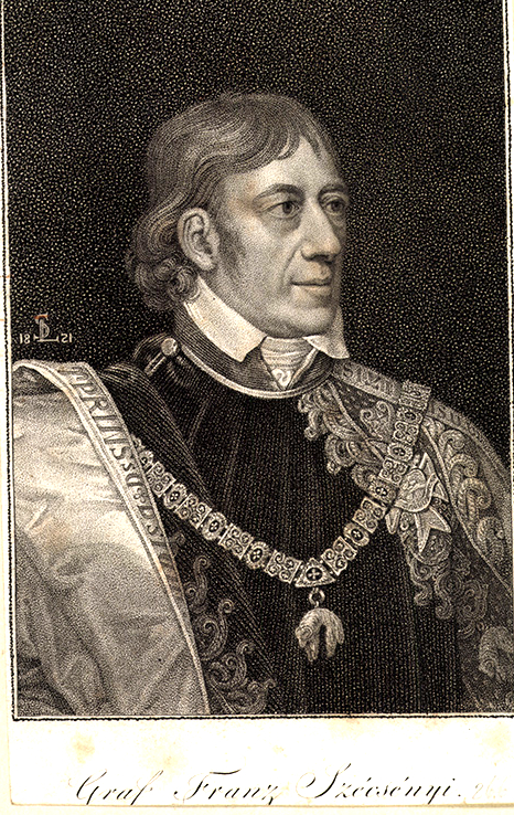 Gróf sárvár-felsővidéki Széchényi Ferenc János József (Széplak, 1754. április 29. – Bécs, 1820. december 13.) Somogy vármegye főispánja, királyi főkamarásmester, aranygyapjas lovag, királyi küldött és biztos, Széchenyi István édesapja.